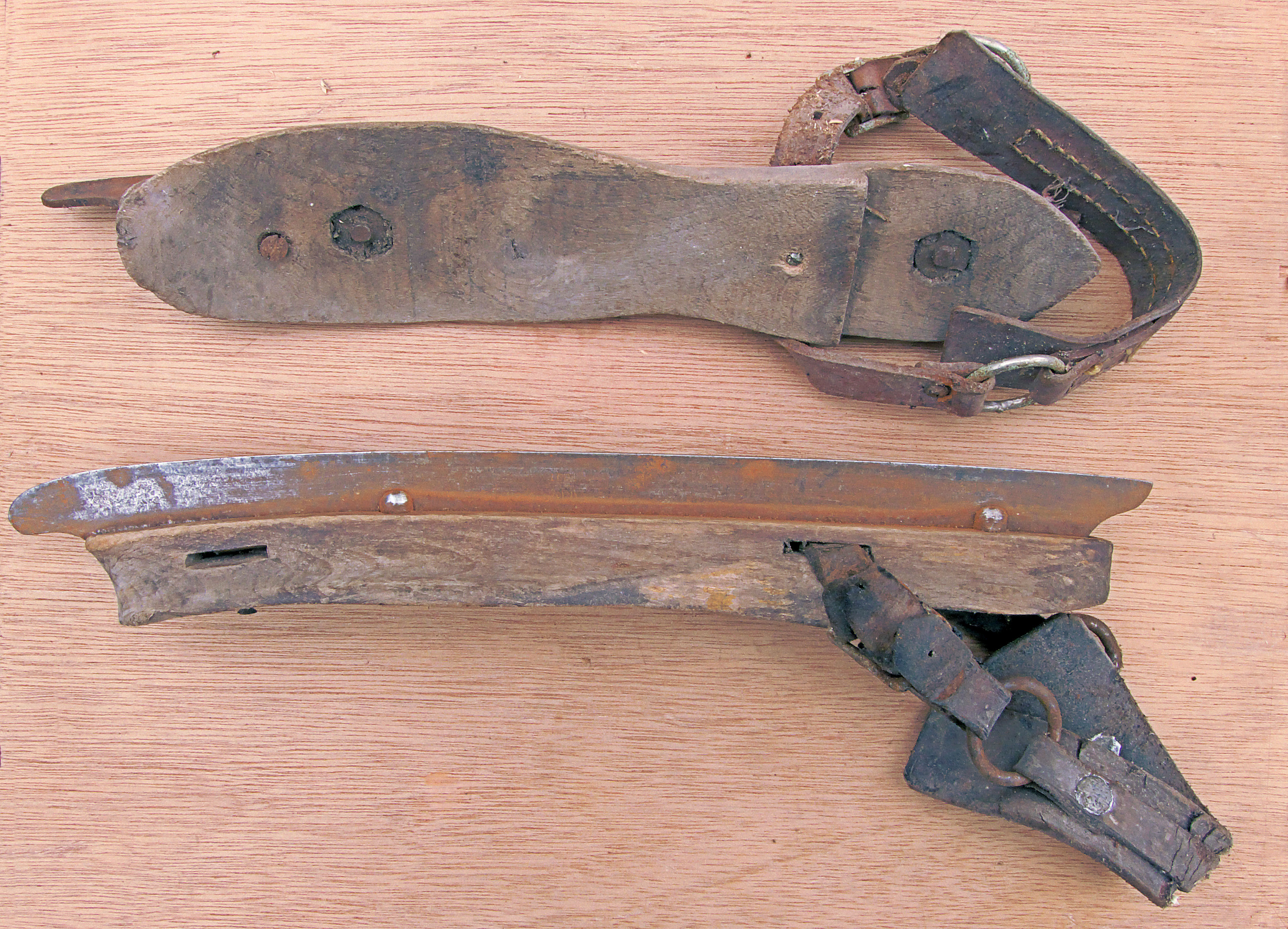 Rondrijschaatsen, oud model